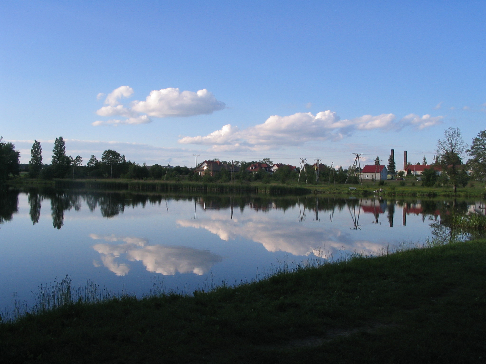 description en: One of so-called ponds, part of a recreation area created in Głogow (small city in south-eastern Poland) in '70. opis pl: Jeden z tak zwanych stawów, część terenów rekreacyjnych stworzonych w Głogowie Małopolskim w latach '70 author/autor: Gardomir (polish wiki:[1]) source/źródło: a photograph taken by me (fotografia wykonana przeze mnie)